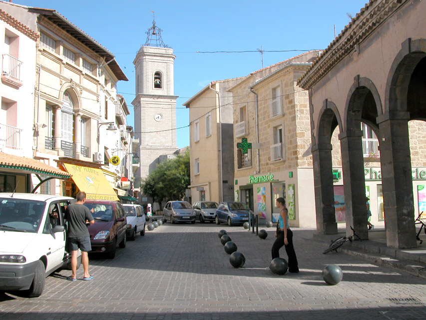 Vue du village de Marseillan. Août 2006.